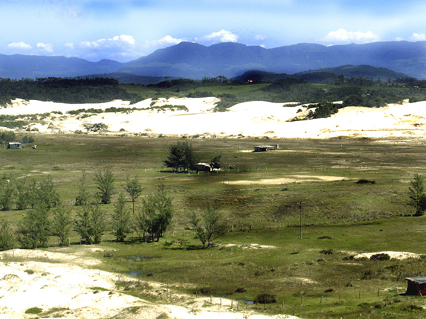 Praia da Cal